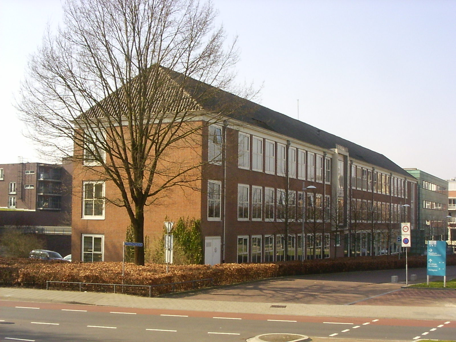 Ede, Raadhuisplein 2, oude Marnixcollege, gemeentelijk monument